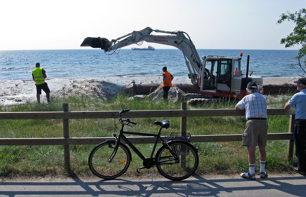 Sandfodring vid Ystad Saltsjöbad 2011.